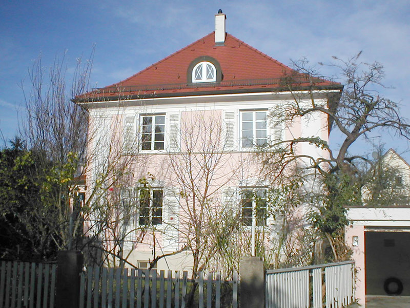 Haus Louis-Hentges-Str. 5 in Heilbronn, denkmalgeschütztes neoklassizistisches Gebäude von 1927